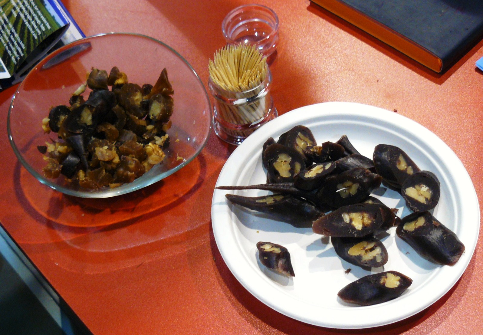 Gruzińskie przysmaki na Tour Salonie w Poznaniu - 2014r.